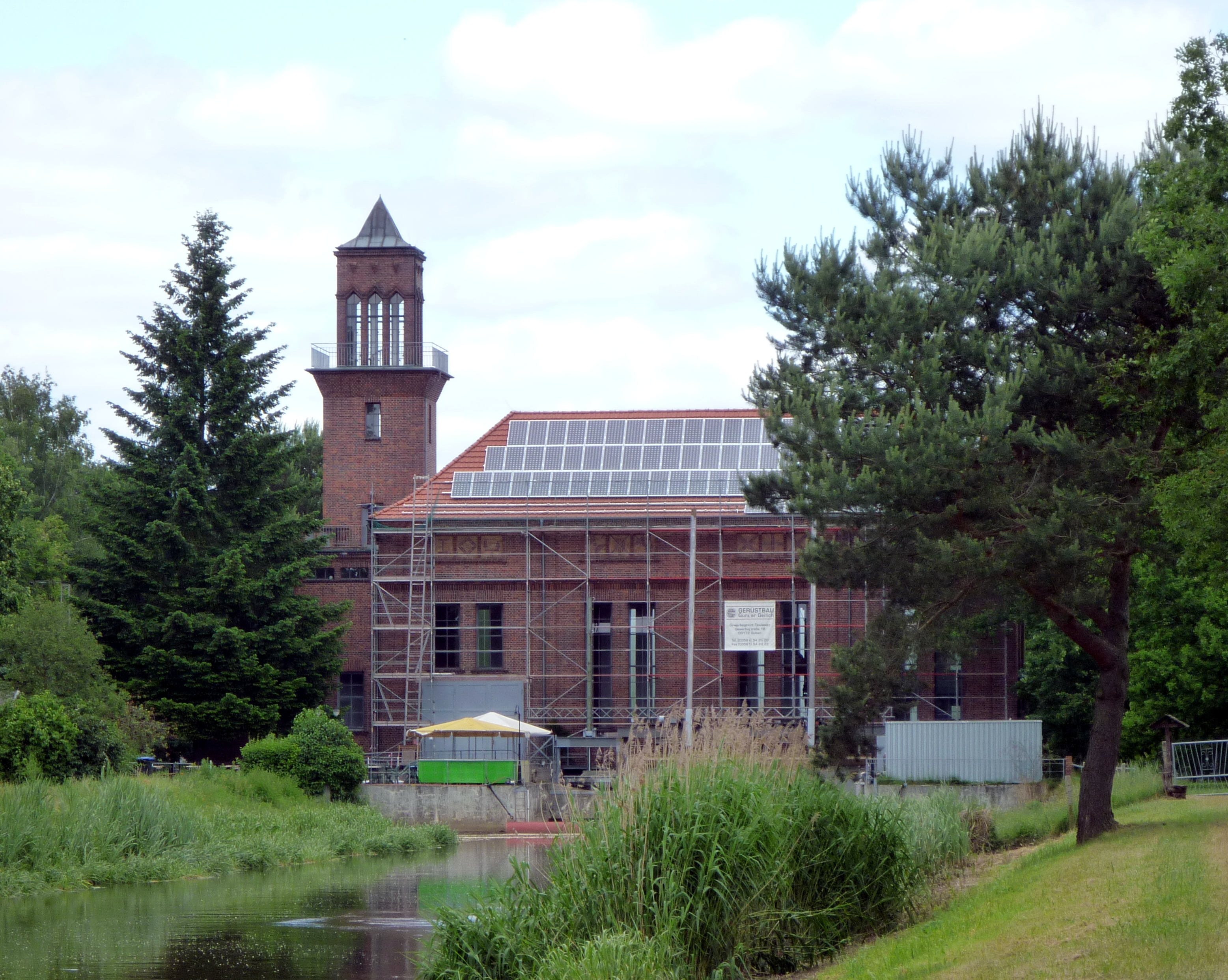 Wasserkraftwerk Grießen (Ortsteil von Jänschwalde)